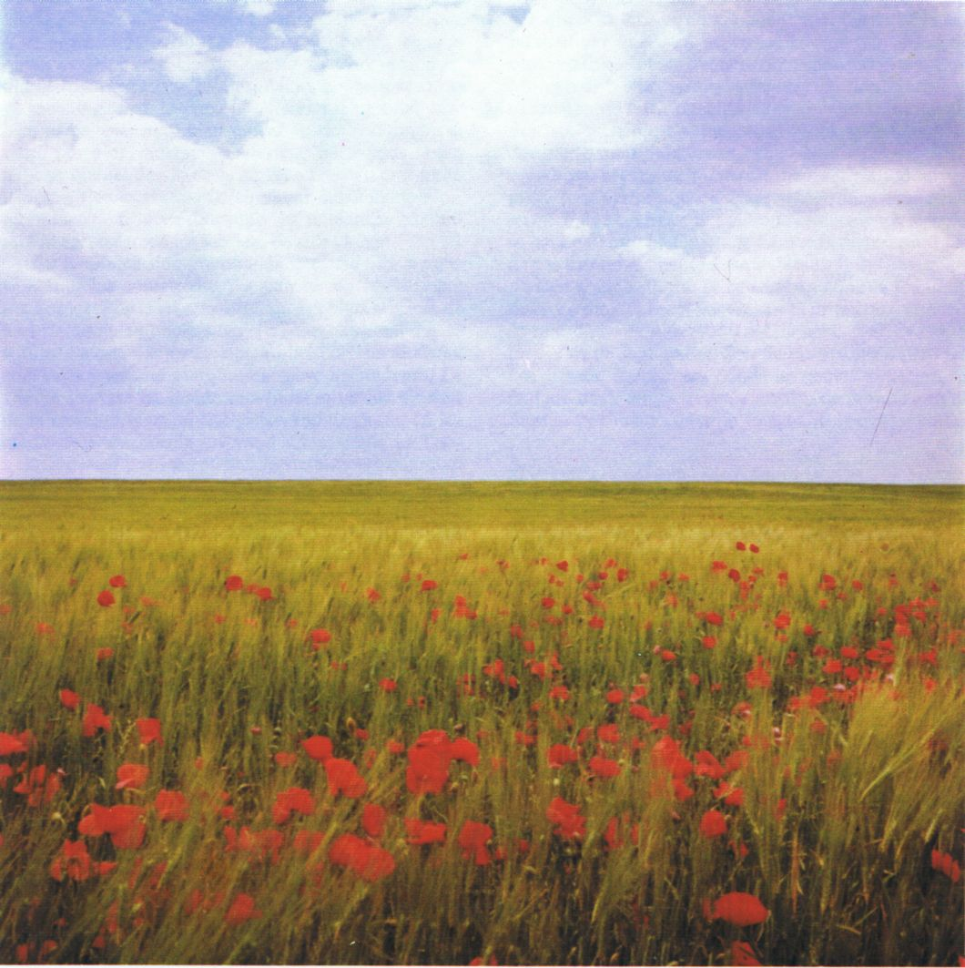 Paisaje de verano de la Mancha de Criptana (campos de cereales).